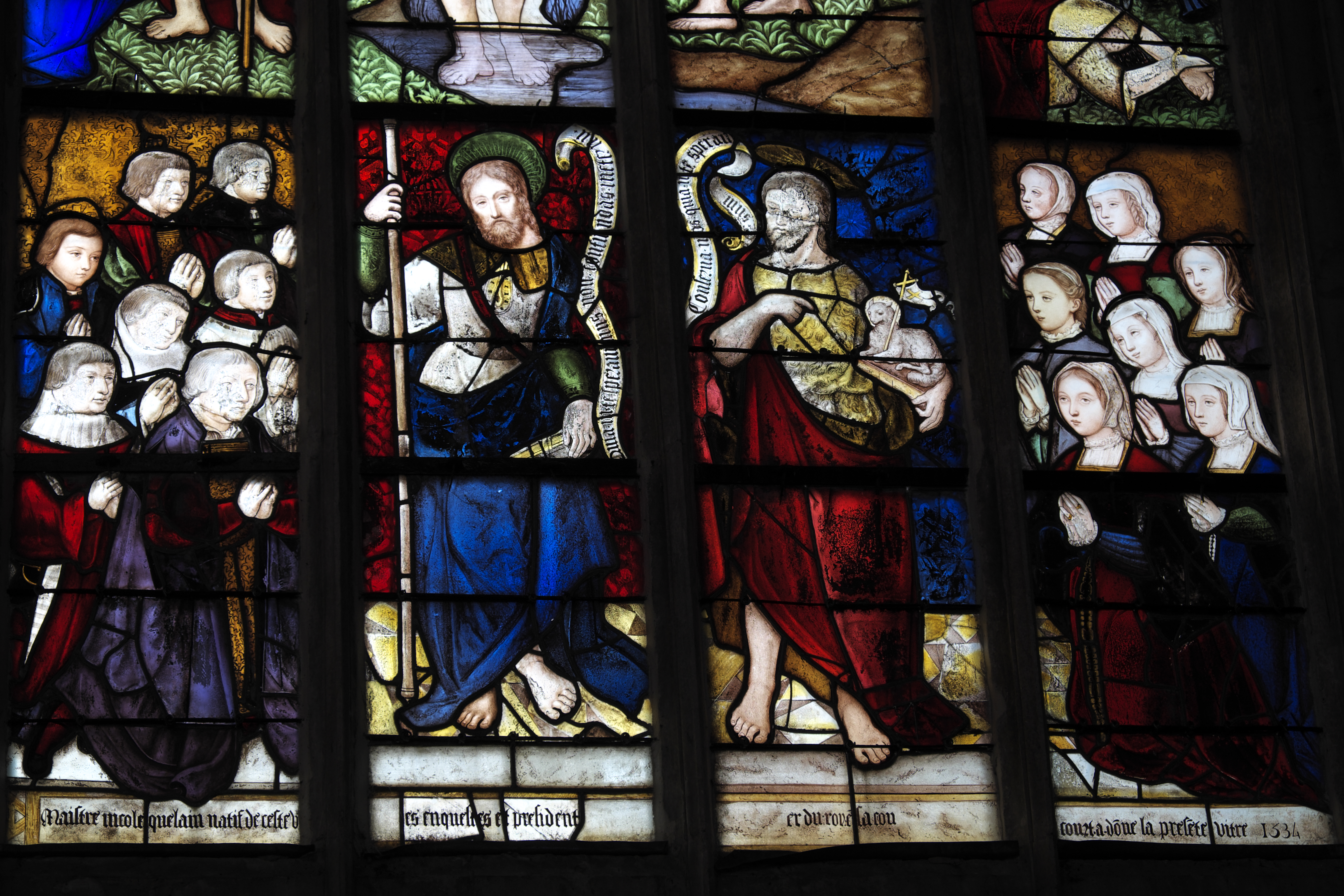 Katholische Pfarrkirche Notre-Dame-des-Marais in La Ferté-Bernard im Département Sarthe (Pays de la Loire/Frankreich), Bleiglasfenster von 1534; Darstellung: Szenen aus dem Leben von Johannes dem Täufer, Stifter (Auschnitt)